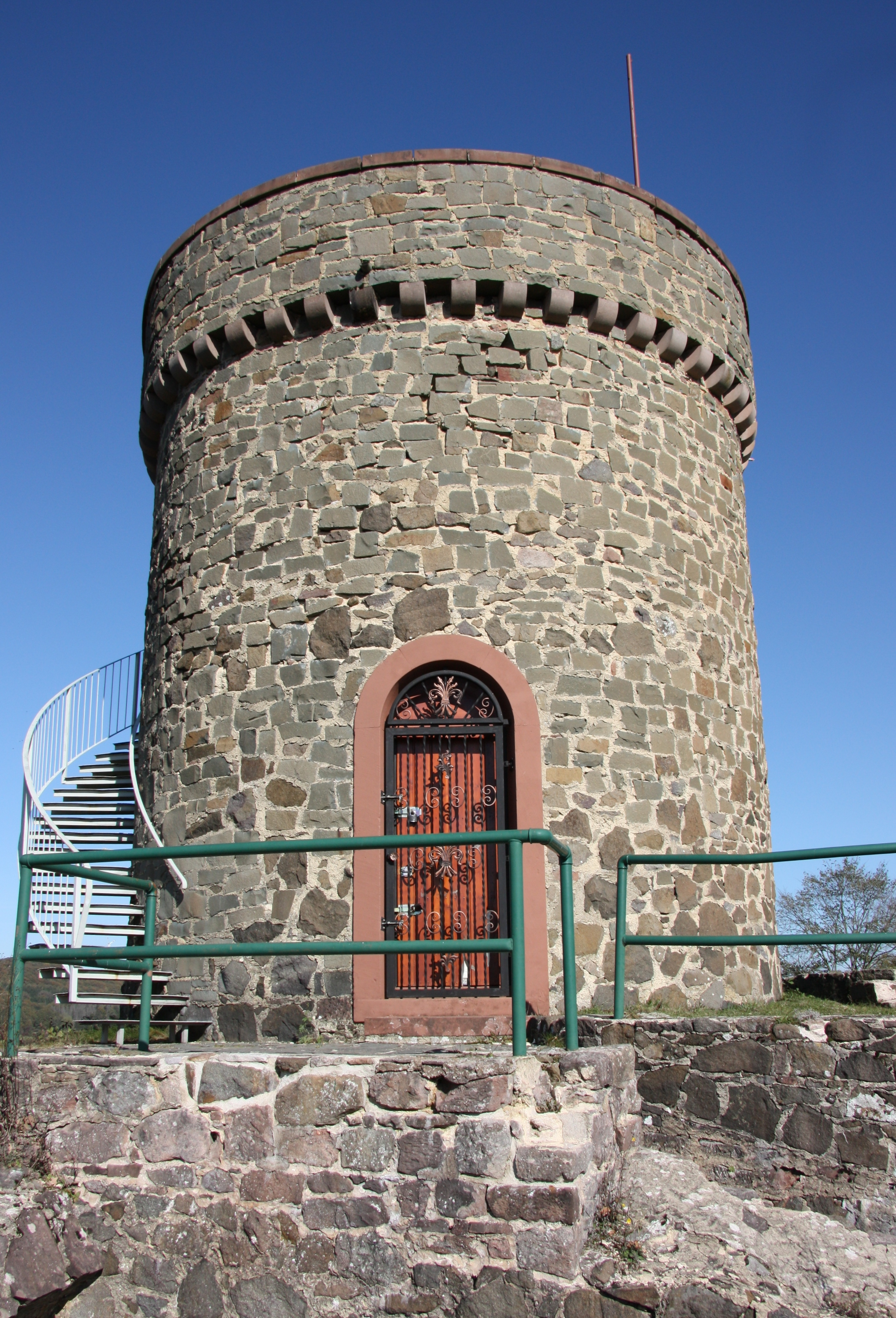 Burgruine Liebenburg